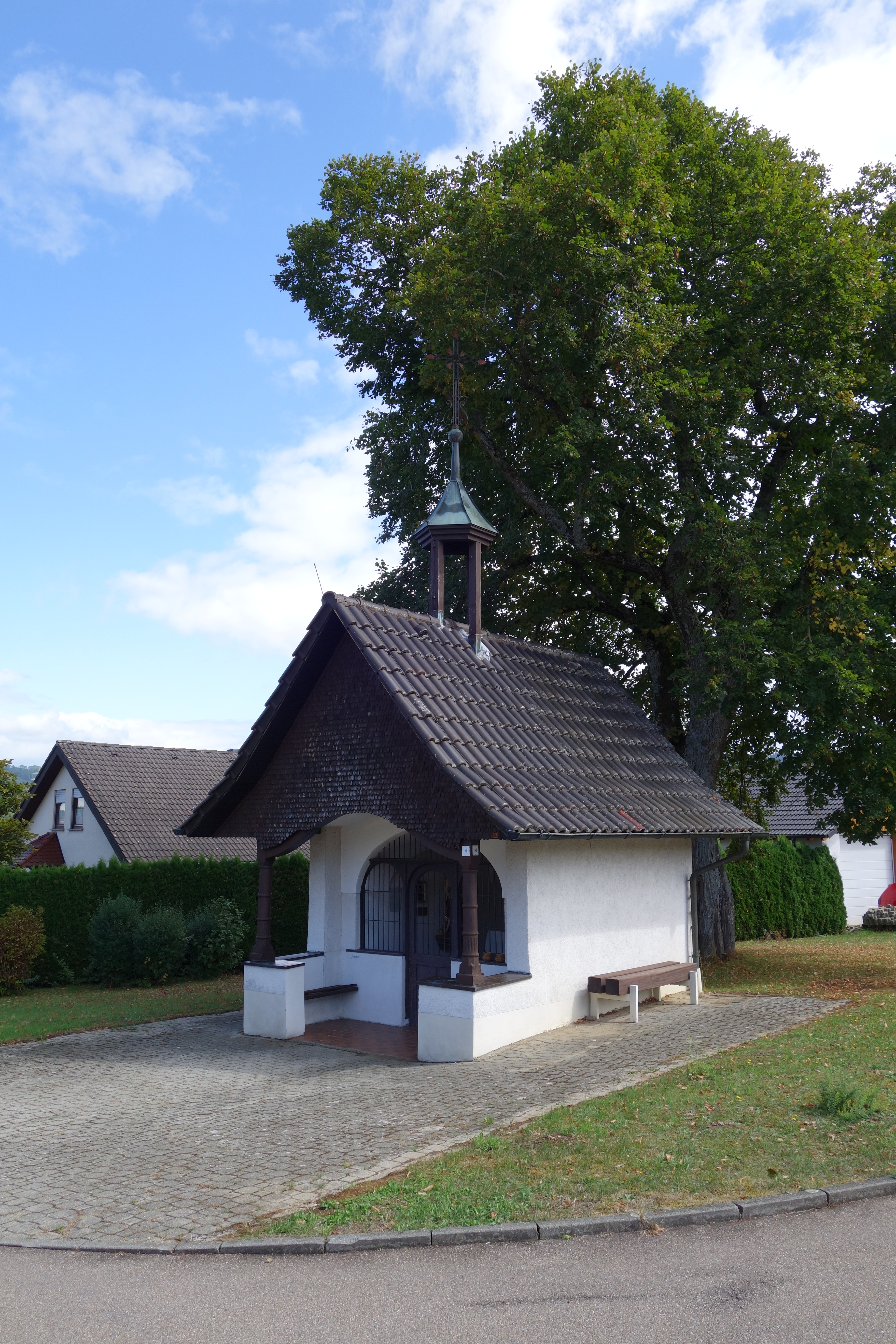 Öschkapelle ("Zwölf-Boten-Kapelle") in Frittlingen, Kapellenstraße 43